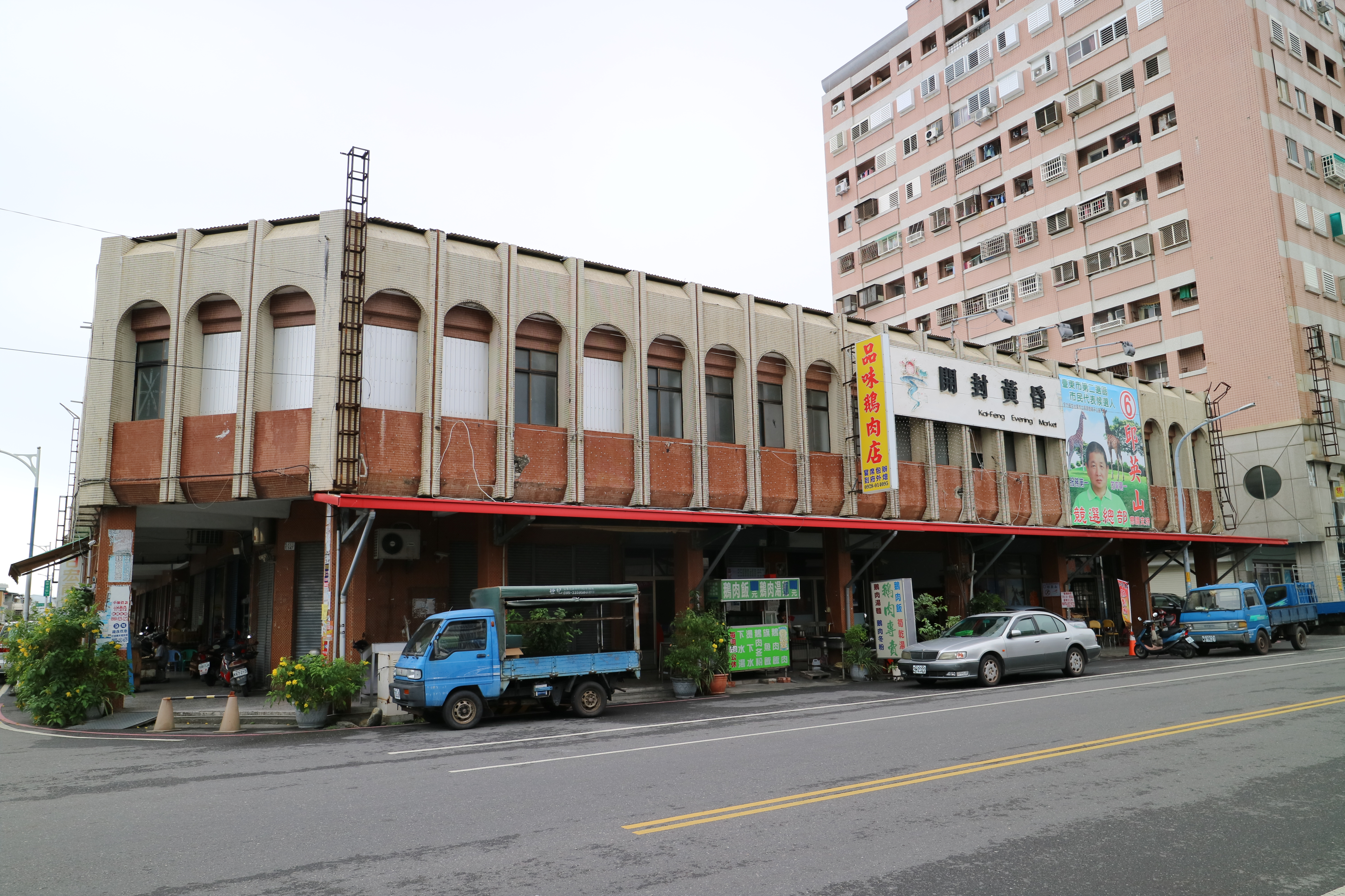 臺東市開封市場外觀